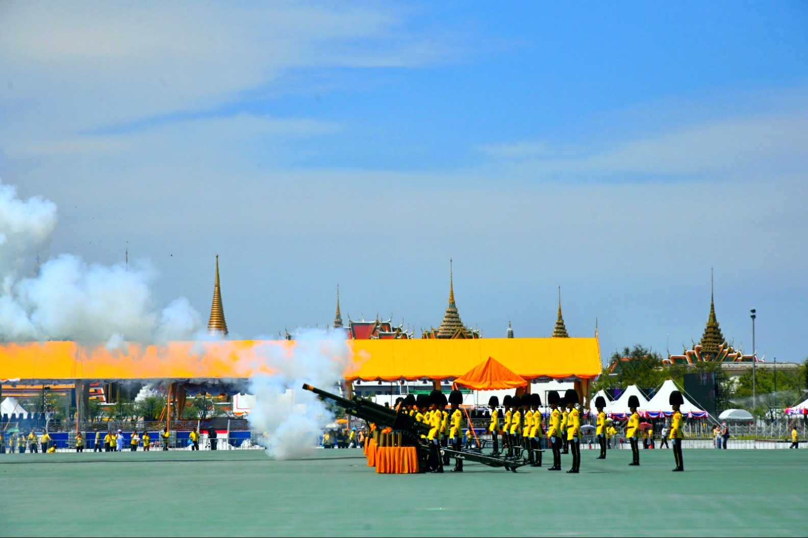 การยิงสลุตในพระราชพิธีบรมราชาภิเษก พุทธศักราช 2562